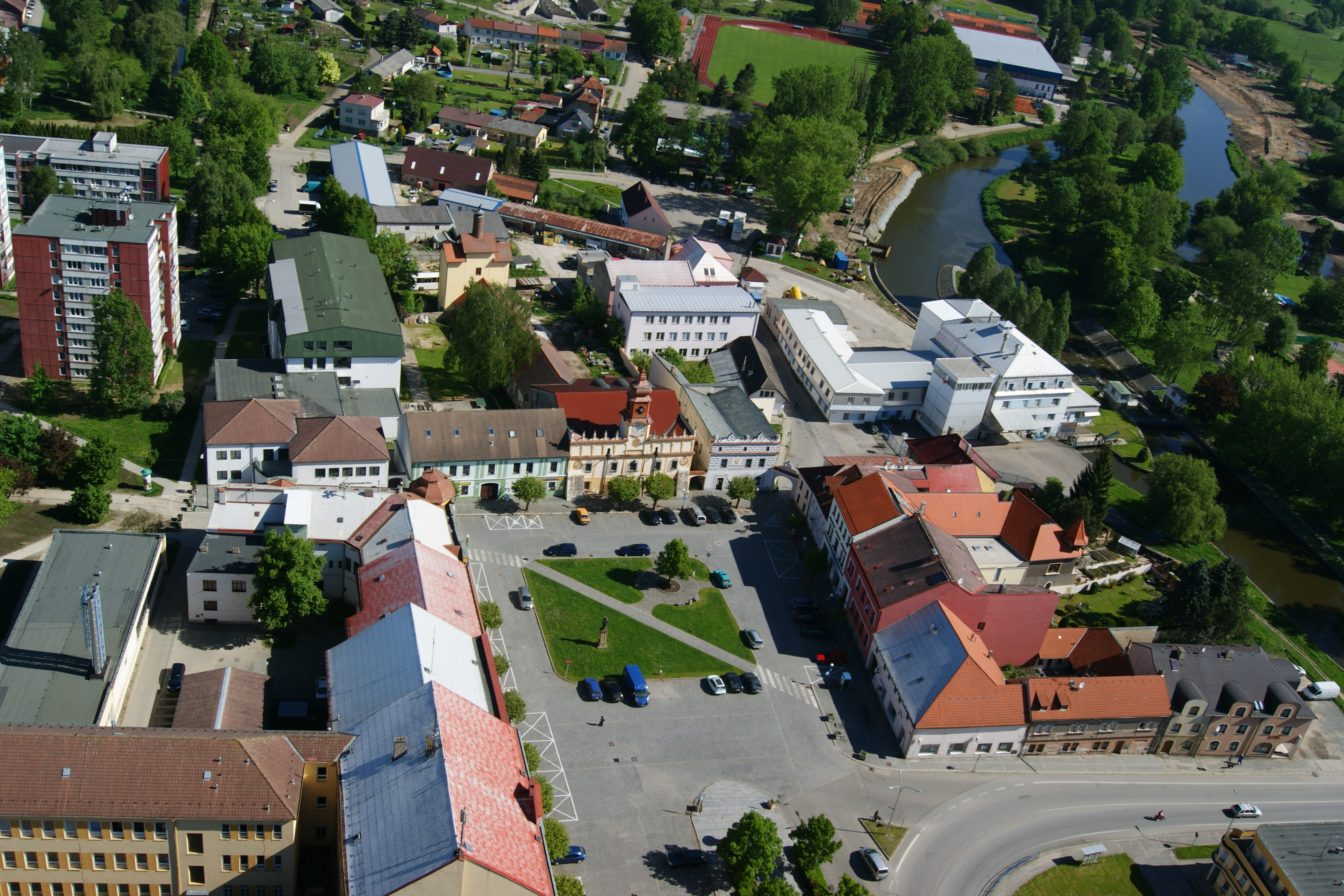 Radnice (Veselí nad Lužnicí), nám. Míru 110, Veselí nad Lužnicí